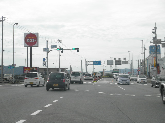 徳島県小松島市小松島町喜来 国道55号徳島南バイパス